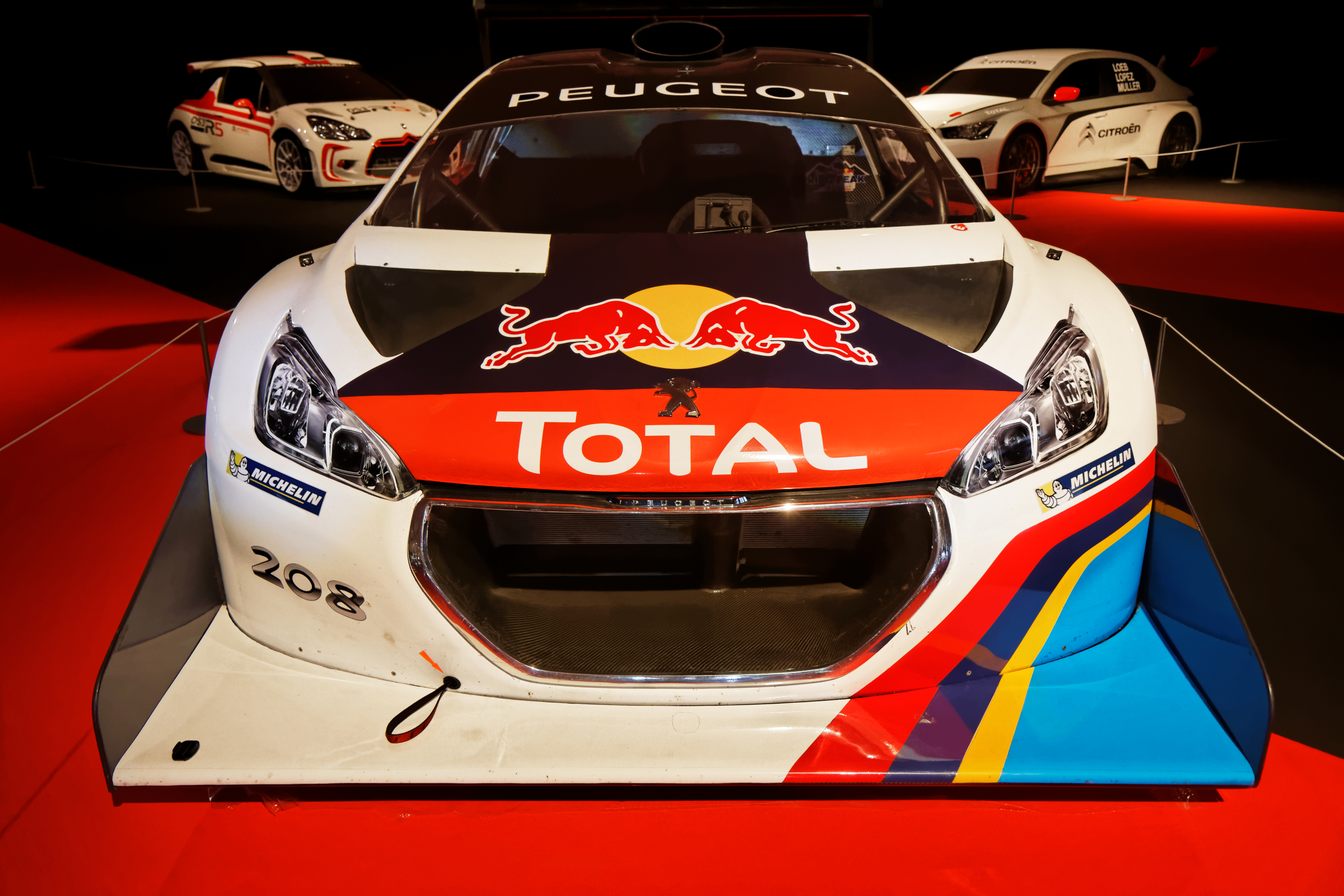 La Peugeot 208 T16 Pikes Peak exposée lors du festival automobile international 2014.